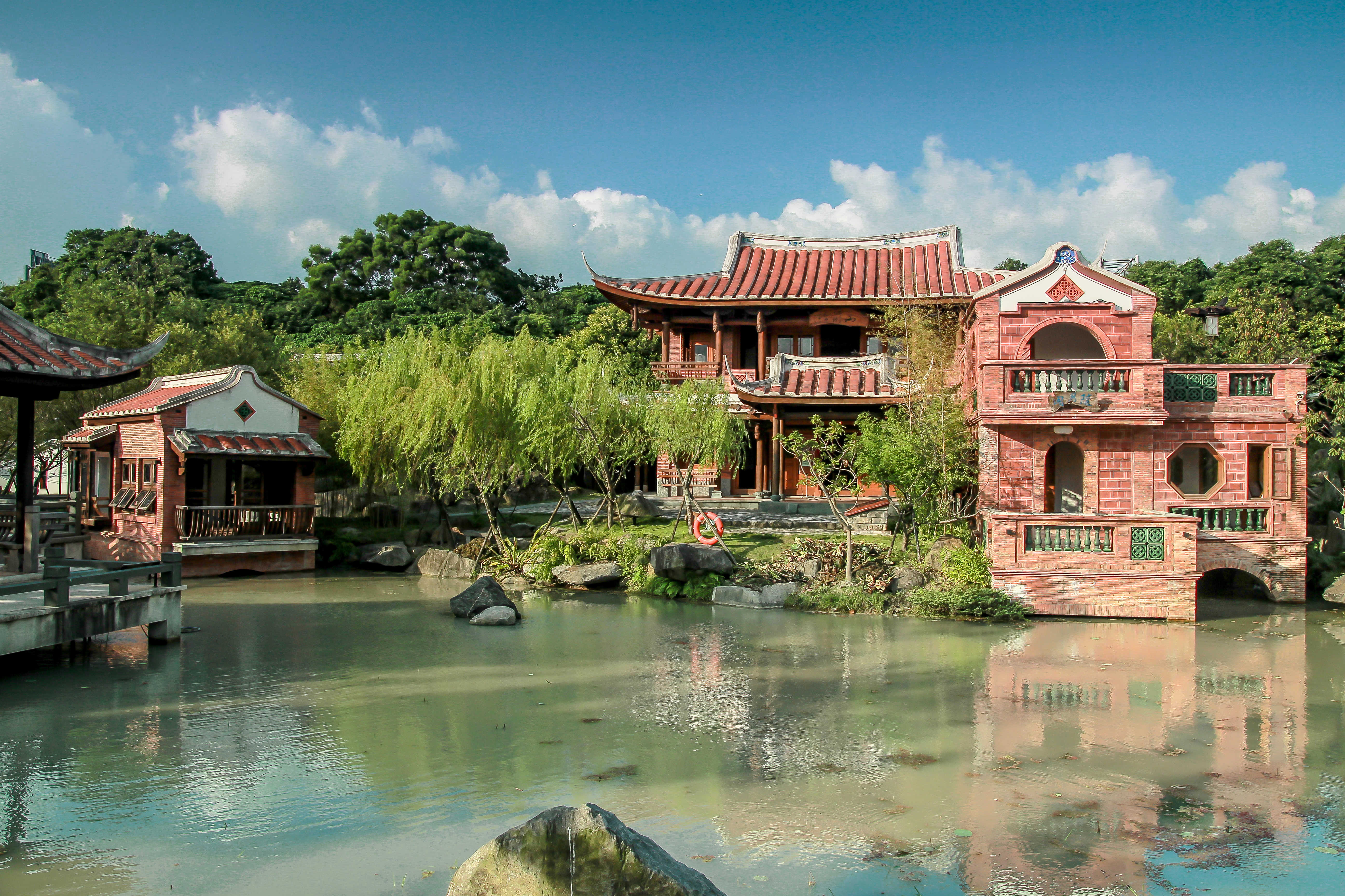 林安泰古厝隨月閣。